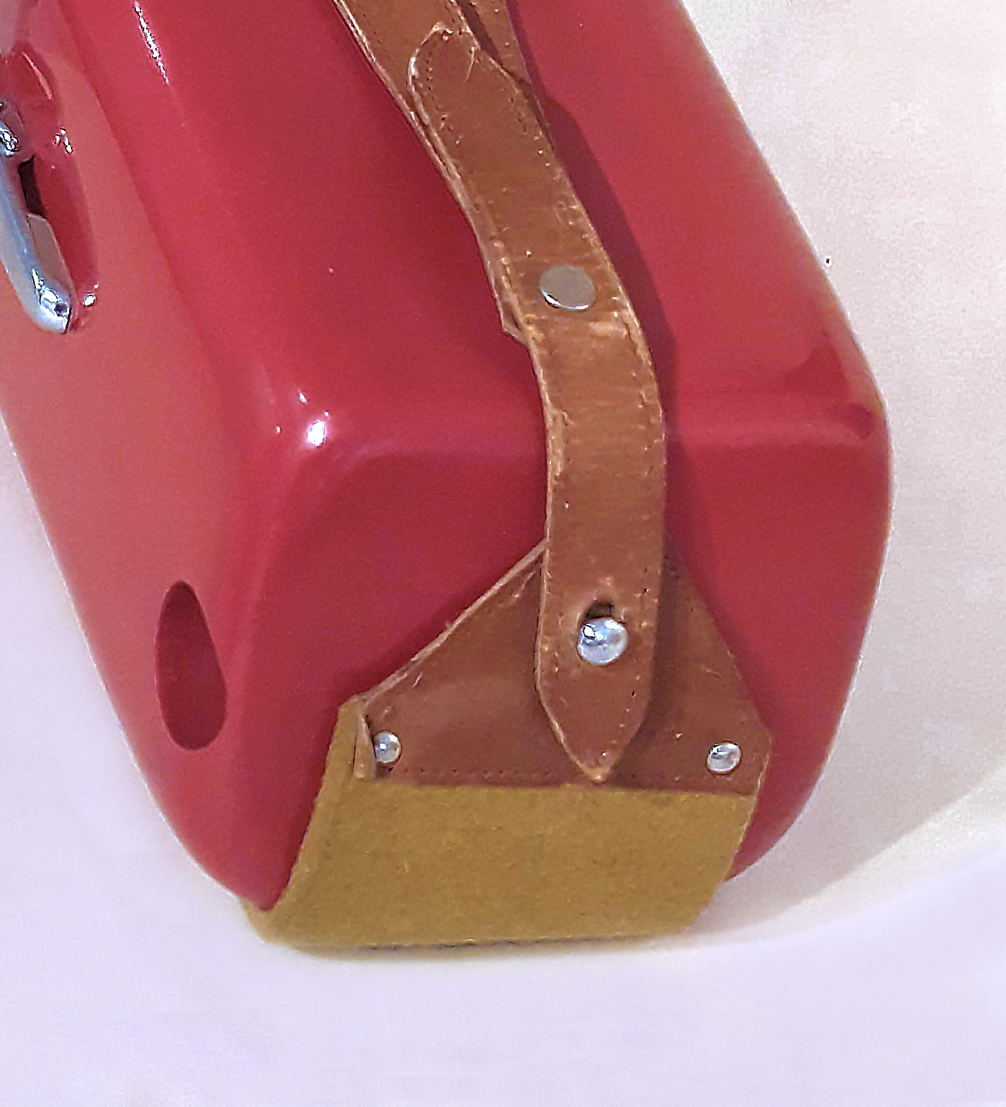 Particolare nottolino dell' aspirapolvere Spalter fotografato in occasione della mostra "A Castiglioni" nella galleria Harry Bertoia a Pordenone nel 2019